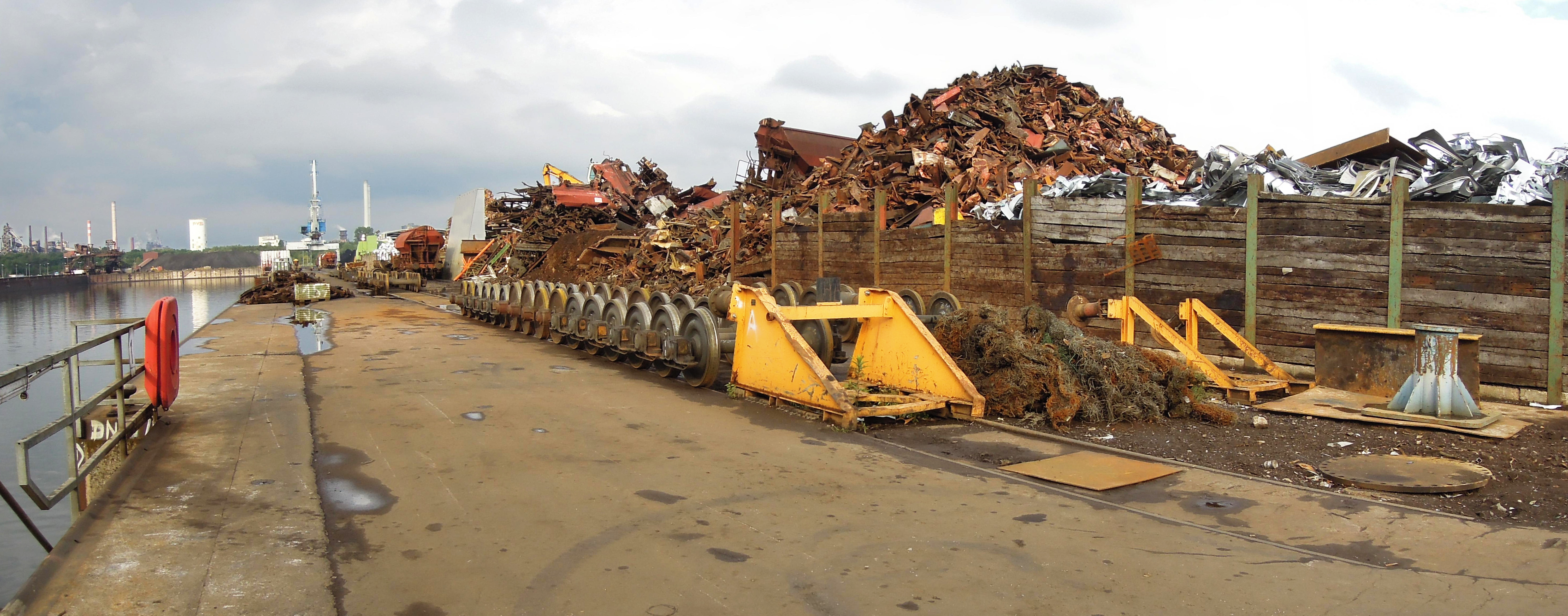 Schrott im Hafen